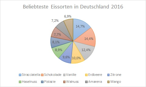 Beliebteste Eissorten der Deutschen 2016. Basis: 1.074 Befragte. Quelle: Hinweis für Verwender ohne Grundkenntnisse in Statistik: Eine Google-Suche nach "beliebte Eissorten" etc. liefert oft Artikel, die auf einer Statistik des UNITEIS e.V. beruhen. Die Uniteis-Statistik ist in sich korrekt, beruht aber auf einer Umfrage unter den Mitgliedern des Verbandes, also ausschließlich italienischen Speiseeisherstellern. Diese Statistik beruht hingegen auf einer bevölkerungsrepräsentativen Umfrage.